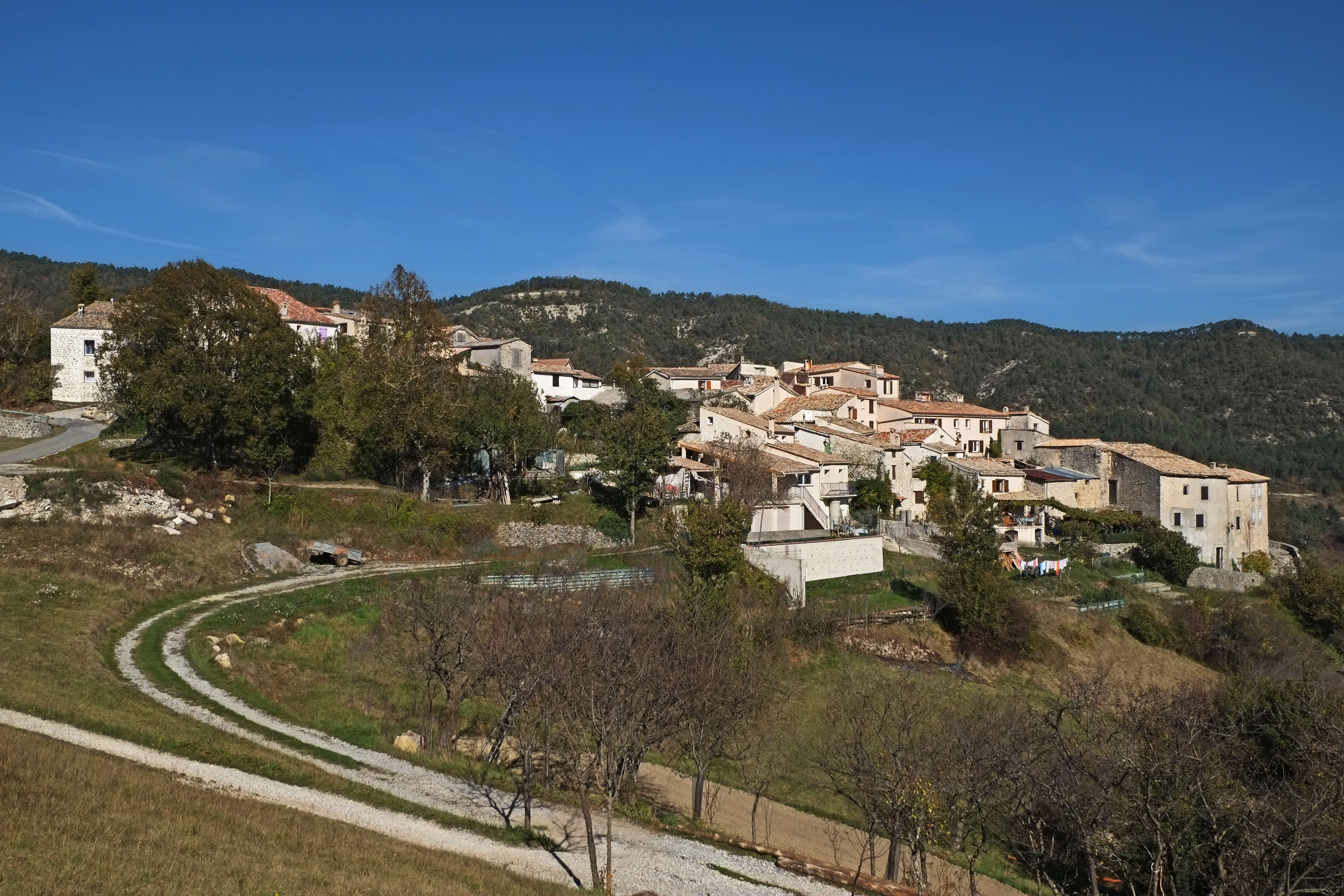 Vue du village de Sallagriffon juste en-dessous de la route de la Vignasse.